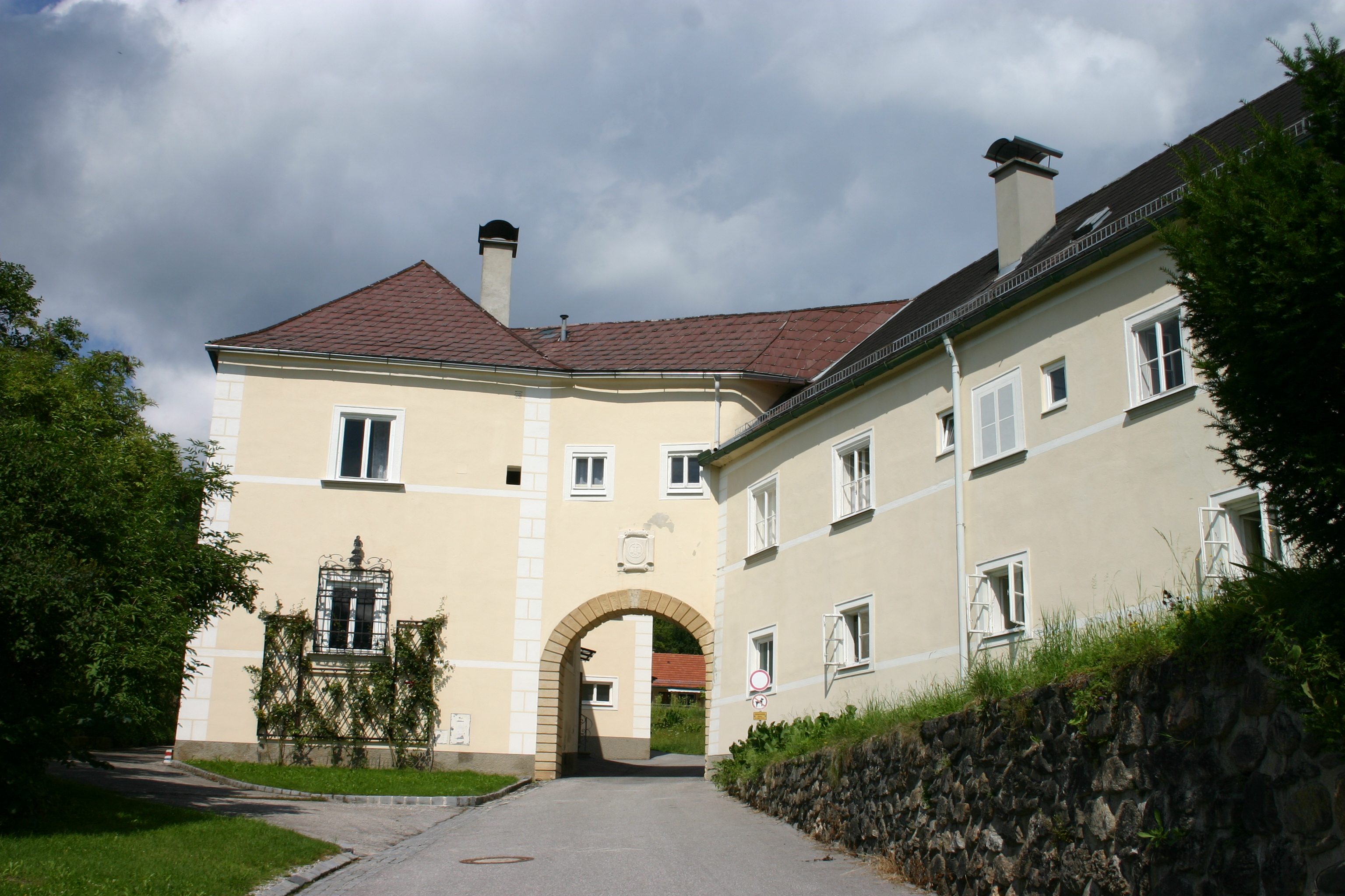 Kirchberg am Wechsel Dominikanerinnen-Kloster (Bild 1)